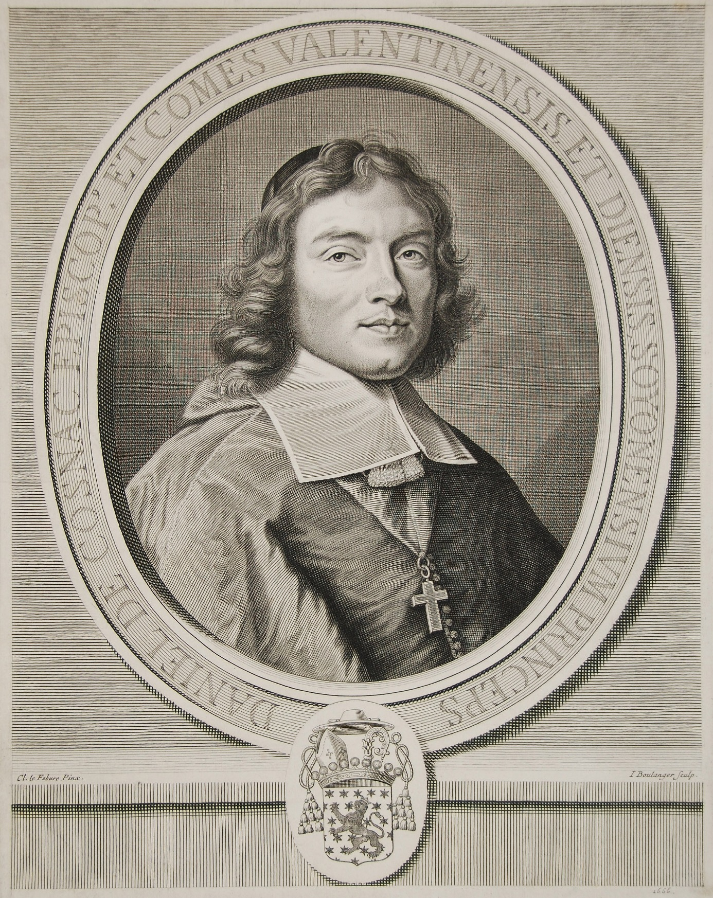 Stich mit dem Porträt Daniel de Cosnacs, Bischof von Aix-en-Provence